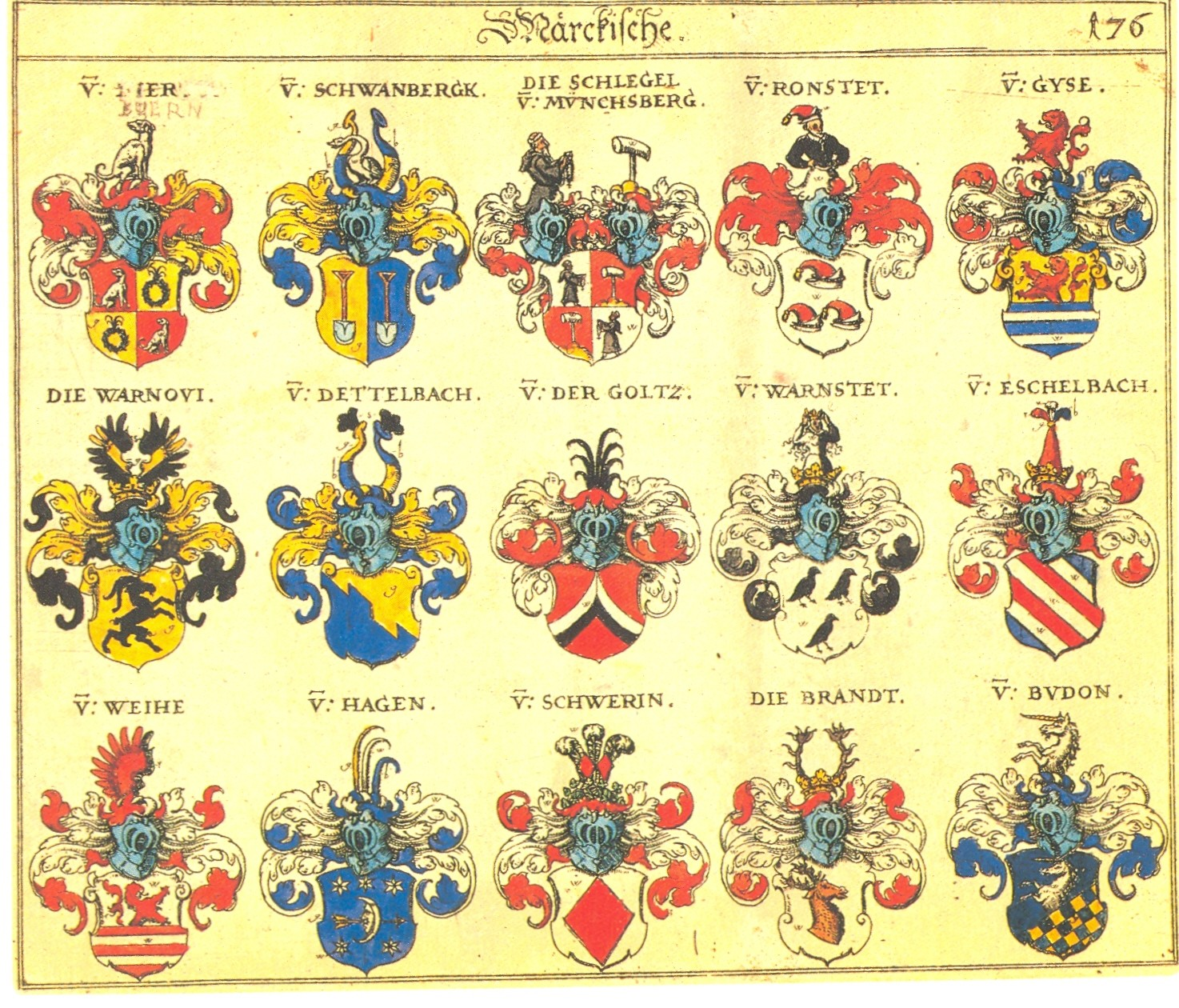 Johann Siebmacher: New Wappenbuch ; eingescannt aus: Horst Appuhn (Hrsg.), Johann Siebmachers Wappenbuch. Die bibliophilen Taschenbücher 538, 2. verb. Aufl , Dortmund 1989. Brandenburger Blatt 176